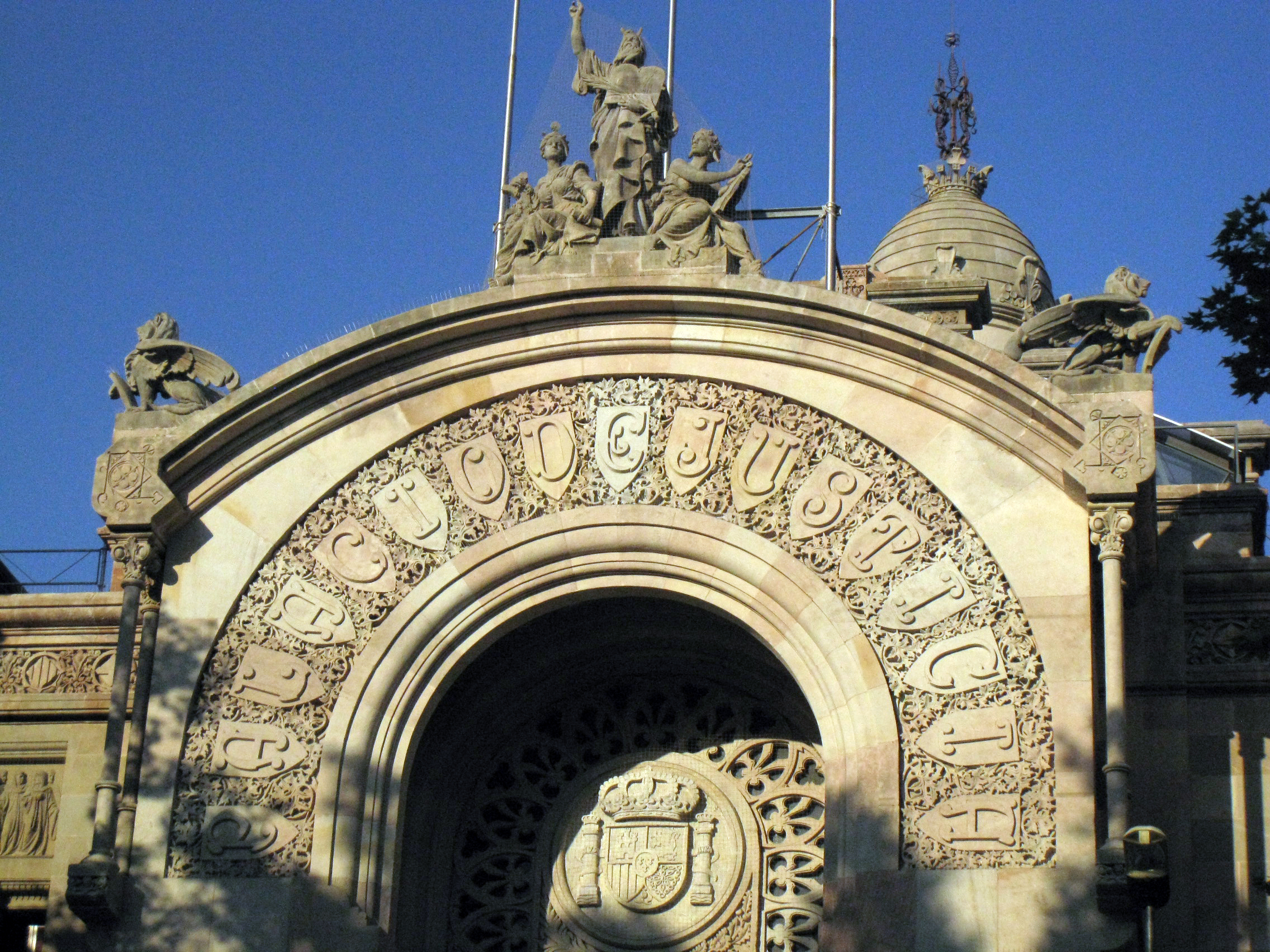 Palau de Justícia (1887-1908), obra de Josep Domènech i Estapà i Enric Sagnier (Barcelona). Detall de la façana principal, al passeig de Lluís Companys: coronament del pòrtic d'entrada, amb el nom de l'edifici i, al damunt, conjunt escultòric de Moisès amb les Taules de la Llei, d'Agustí Querol.